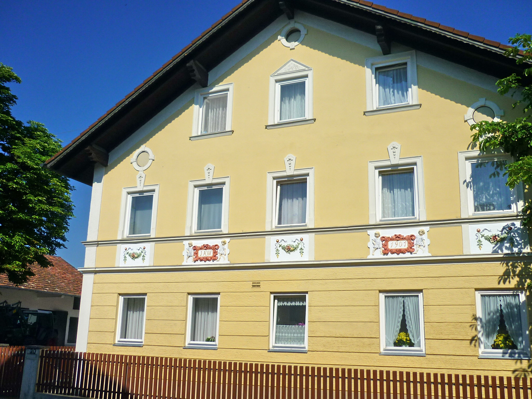 Ismaning (Schaderhof, Hauptstr.20)